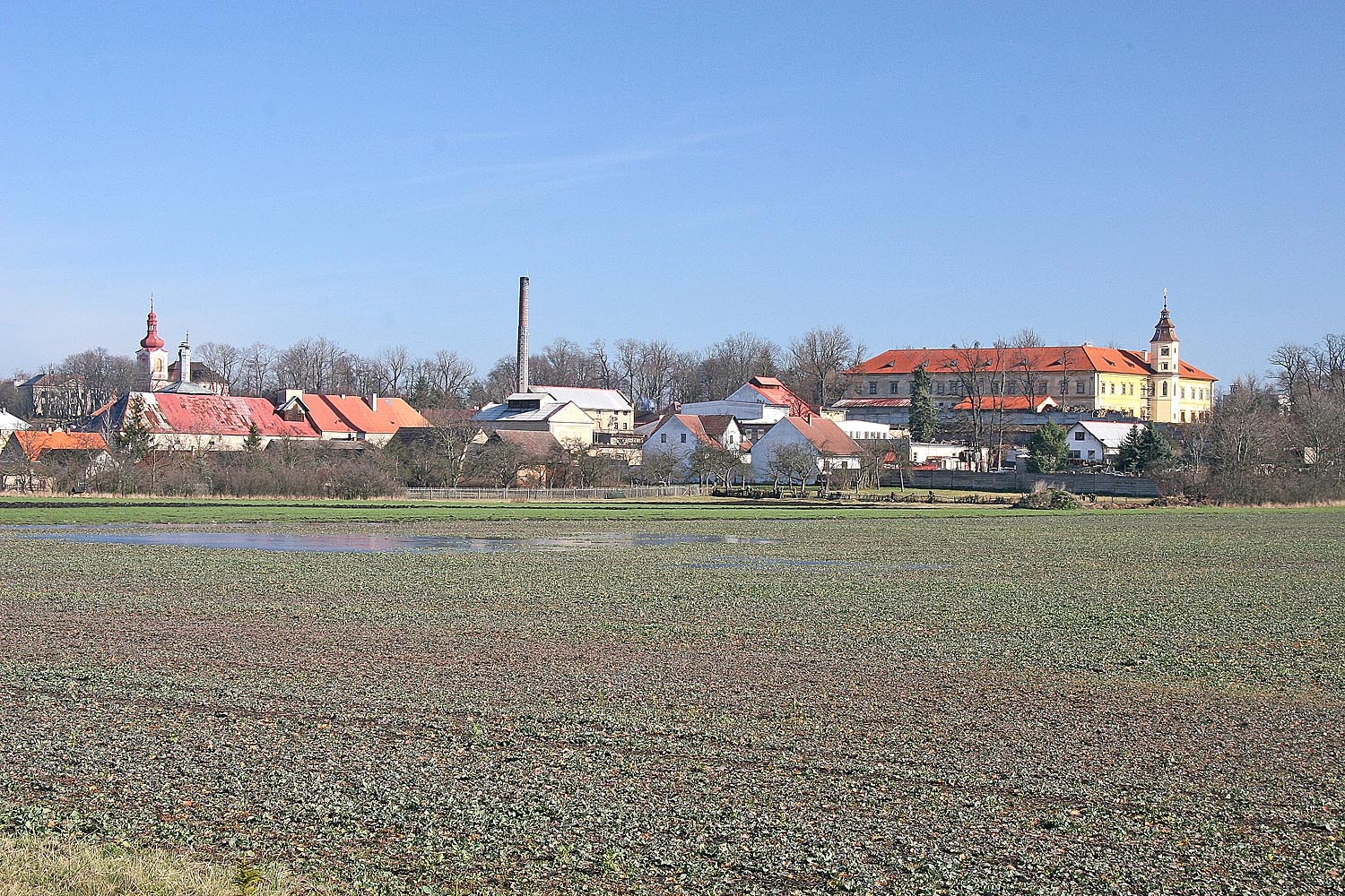 Pohled na zámek v Dymokurech ze silnice do Netřebic, district Nymburk autor:Prazak date: 17. 2. 2007